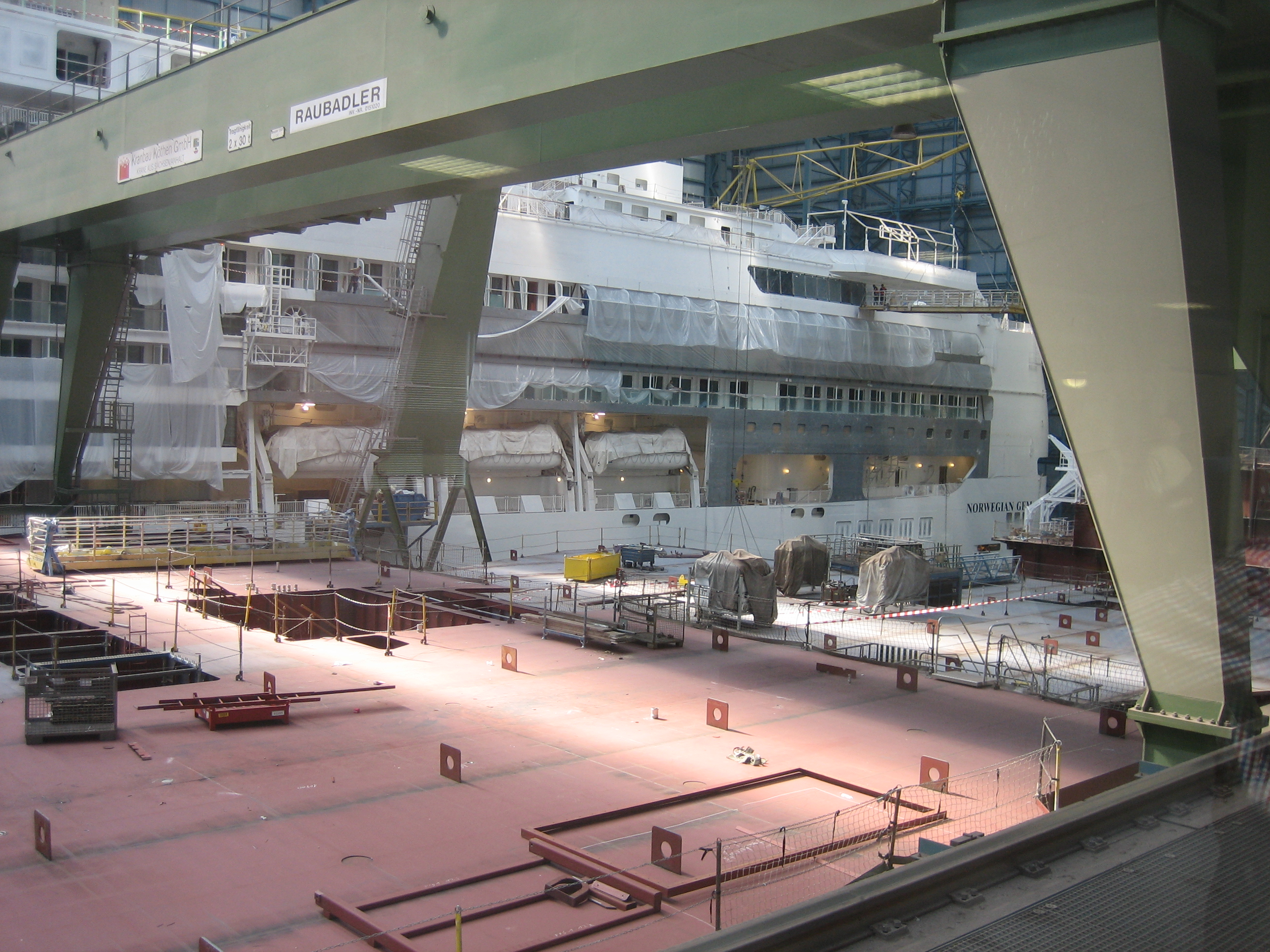 (de) Das Kreuzfahrtschiff Norwegian Gem in der neuen Werkshalle der Meyer Werft in Papenburg (en) Cruise ship Norwegian Gem at the Meyer Werft, Papenburg, Germany